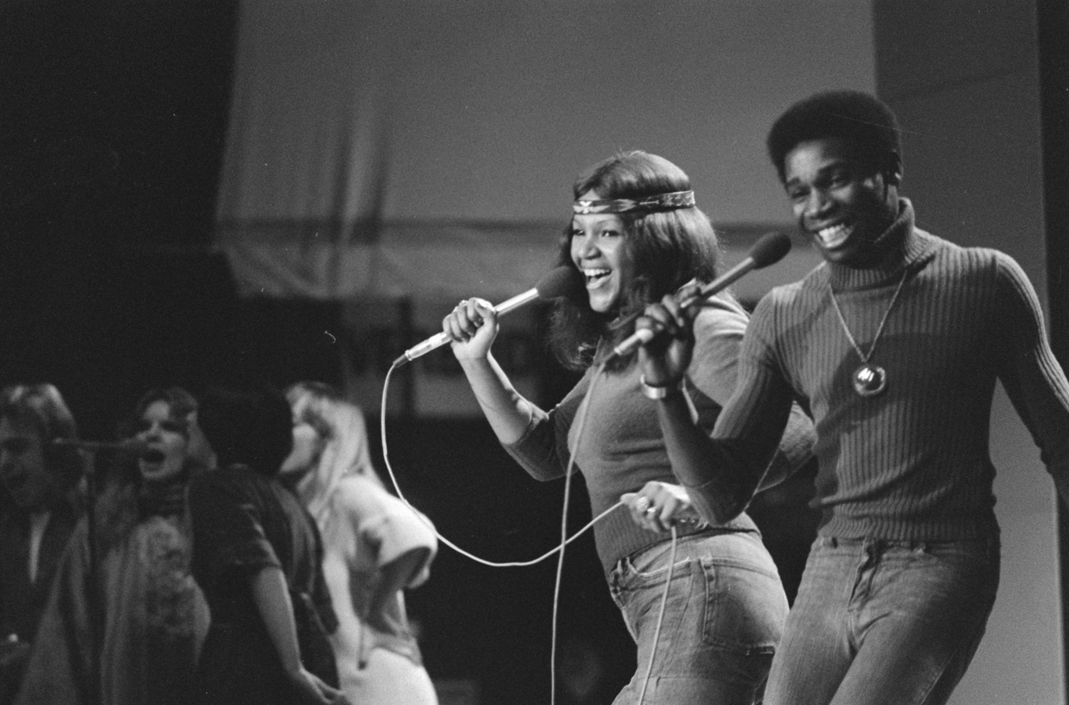 Collectie / Archief : Fotocollectie Anefo Reportage / Serie : [ onbekend ] Beschrijving : Repetities Nederlands Songfestival ; Spooky+en Sue tijdens repetities Datum : 17 februari 1976 Trefwoorden : REPETITIES, songfestivals Fotograaf : Peters, Hans / Anefo Auteursrechthebbende : Nationaal Archief Materiaalsoort : Negatief (zwart/wit) Nummer archiefinventaris : bekijk toegang 2.24.01.05 Bestanddeelnummer : 928-4181